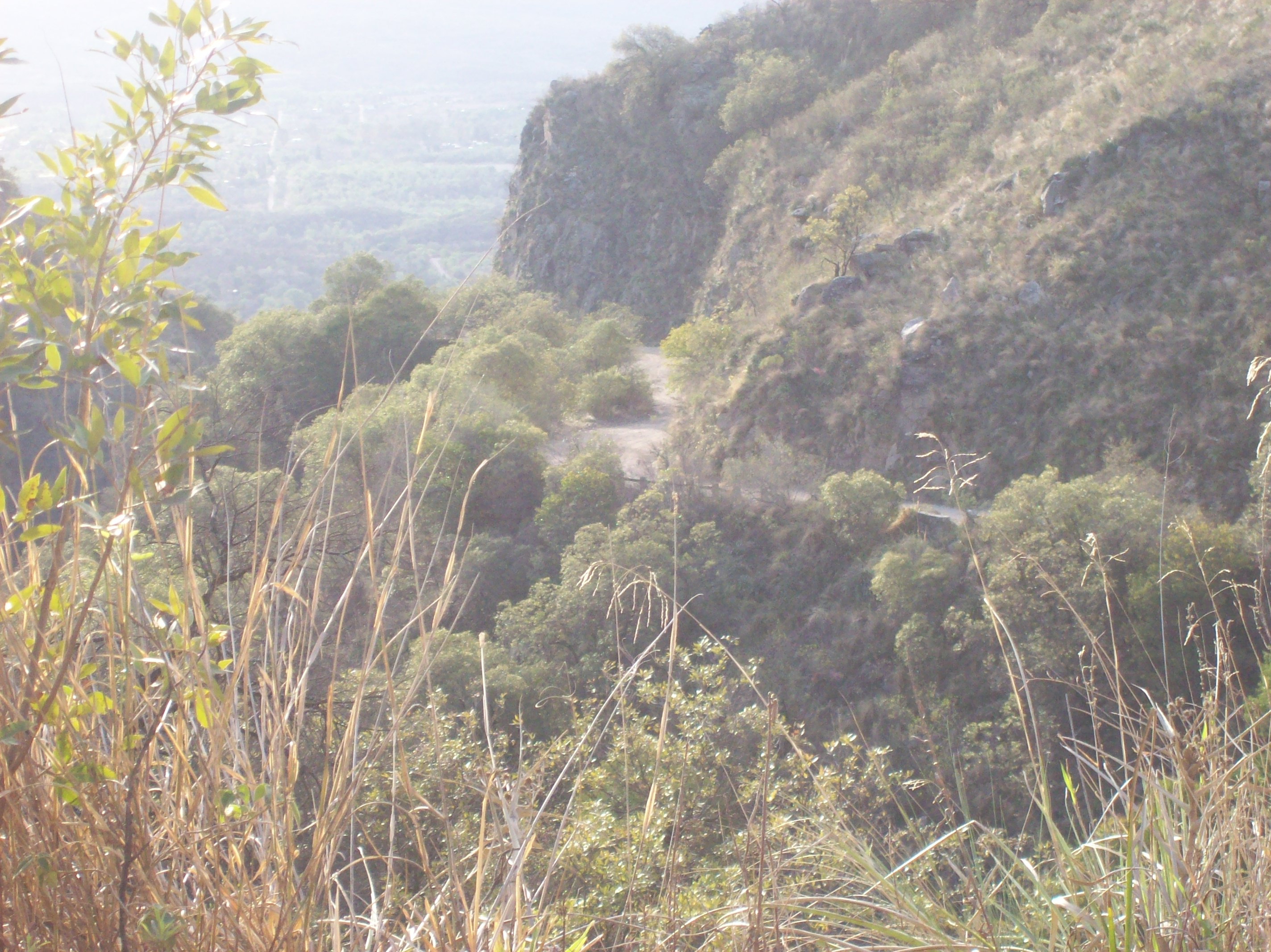 Ruta Provincial E-54 hacia el oeste, entre la base del Cerro Pan de Azúcar y la Ruta Nacional 38 en Cosquín, departamento Punilla, provincia de Córdoba, Argentina.